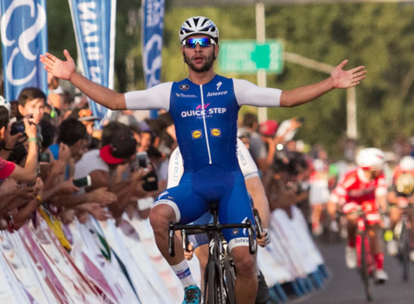 Fernando Gaviria ganador etapa 1 - Vuelta a San Juan 2017